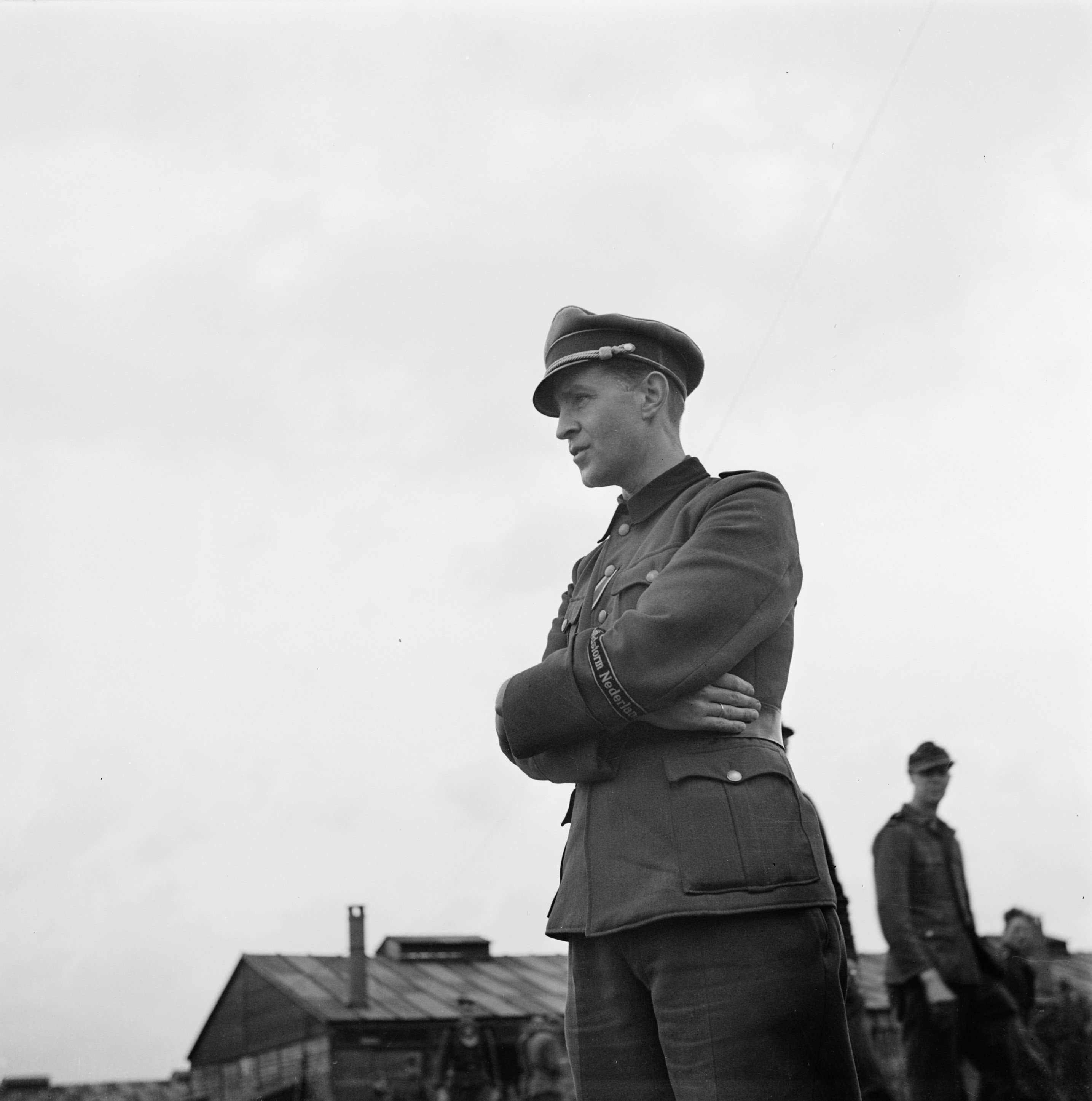 Offizier 34. SS-Freiwilligen-Grenadier-Division „Landstorm Nederland“ (niederländische Nr. 2)